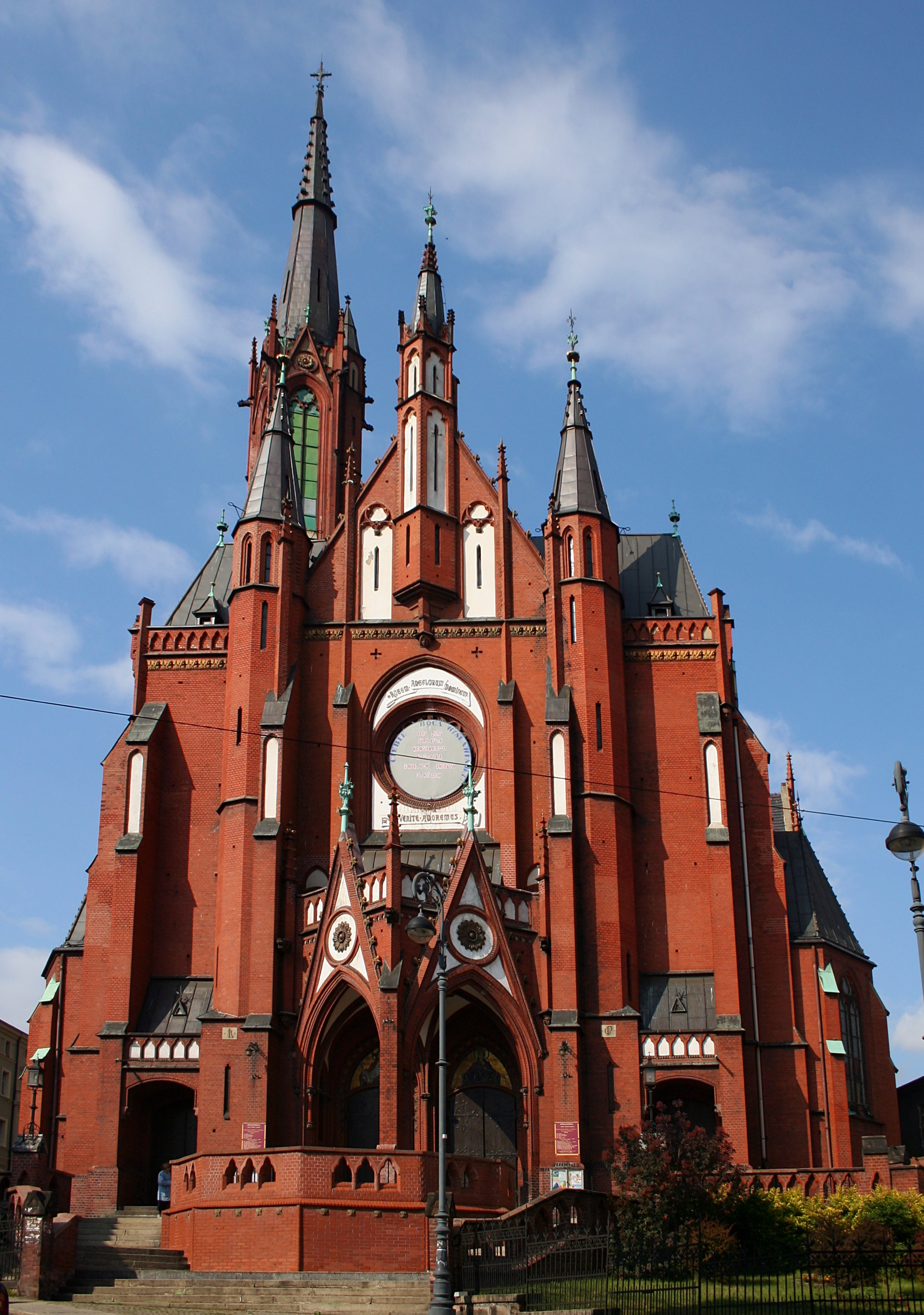 Wałbrzych, ul. Moniuszki - neogotycka kolegiata pw. Najświętszej Marii Panny Bolesnej i Św. Aniołów Stróżów, 1899-1904